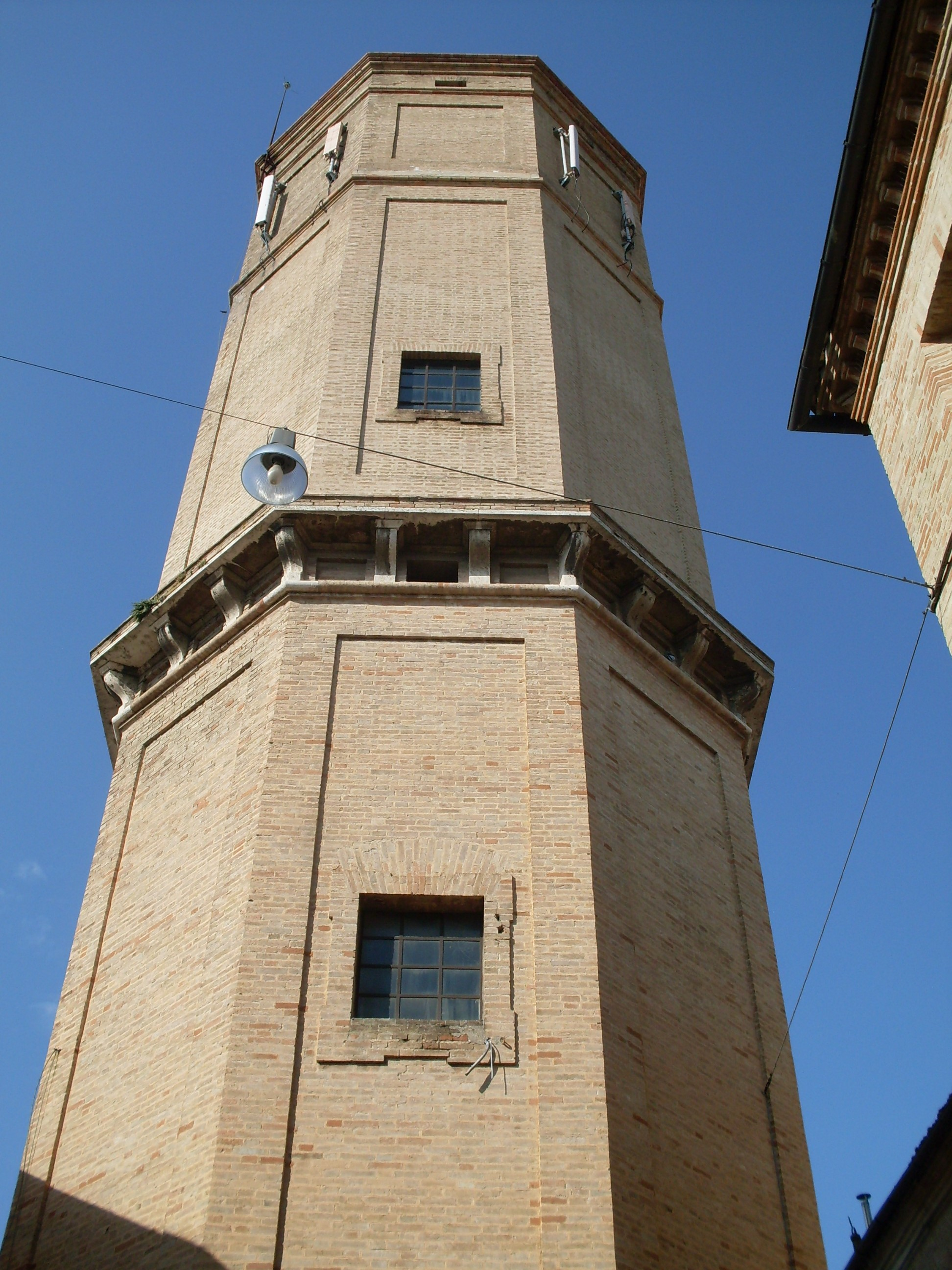 Recanati Torre del Passero solitario